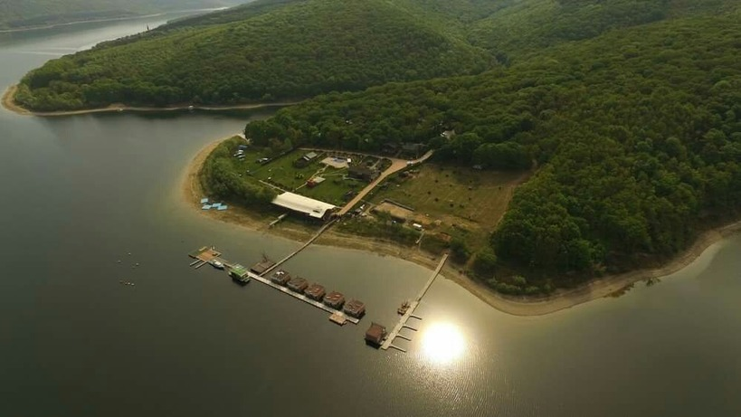 яхт-клуб Westriver на реке Днестр